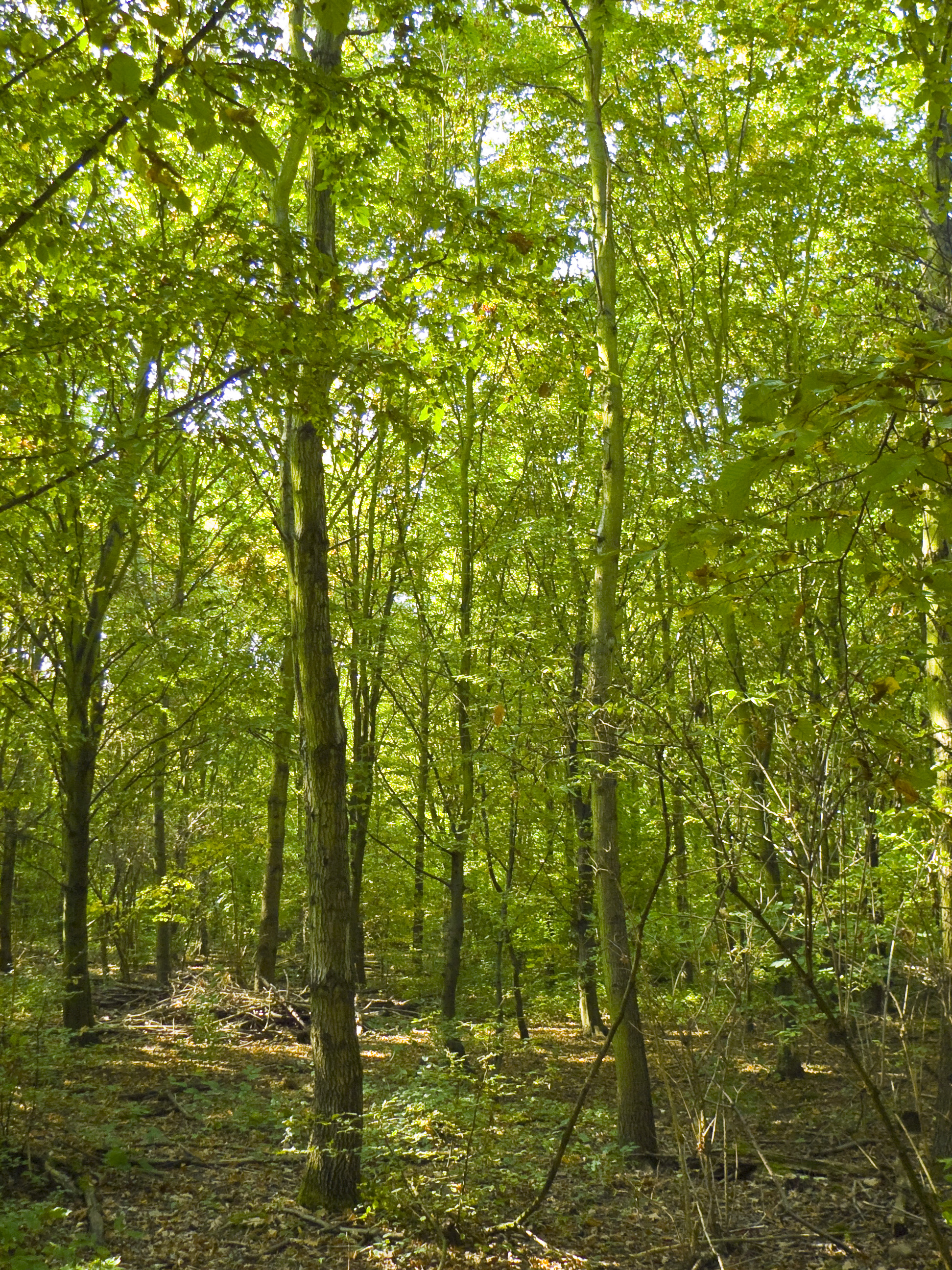 Arboretum Main-Taunus, Eichen-Hainbuchen-Mischwälder, im Vordergrund: Stieleiche (Quercus robur) und Hainbuche (Carpinus betulus)